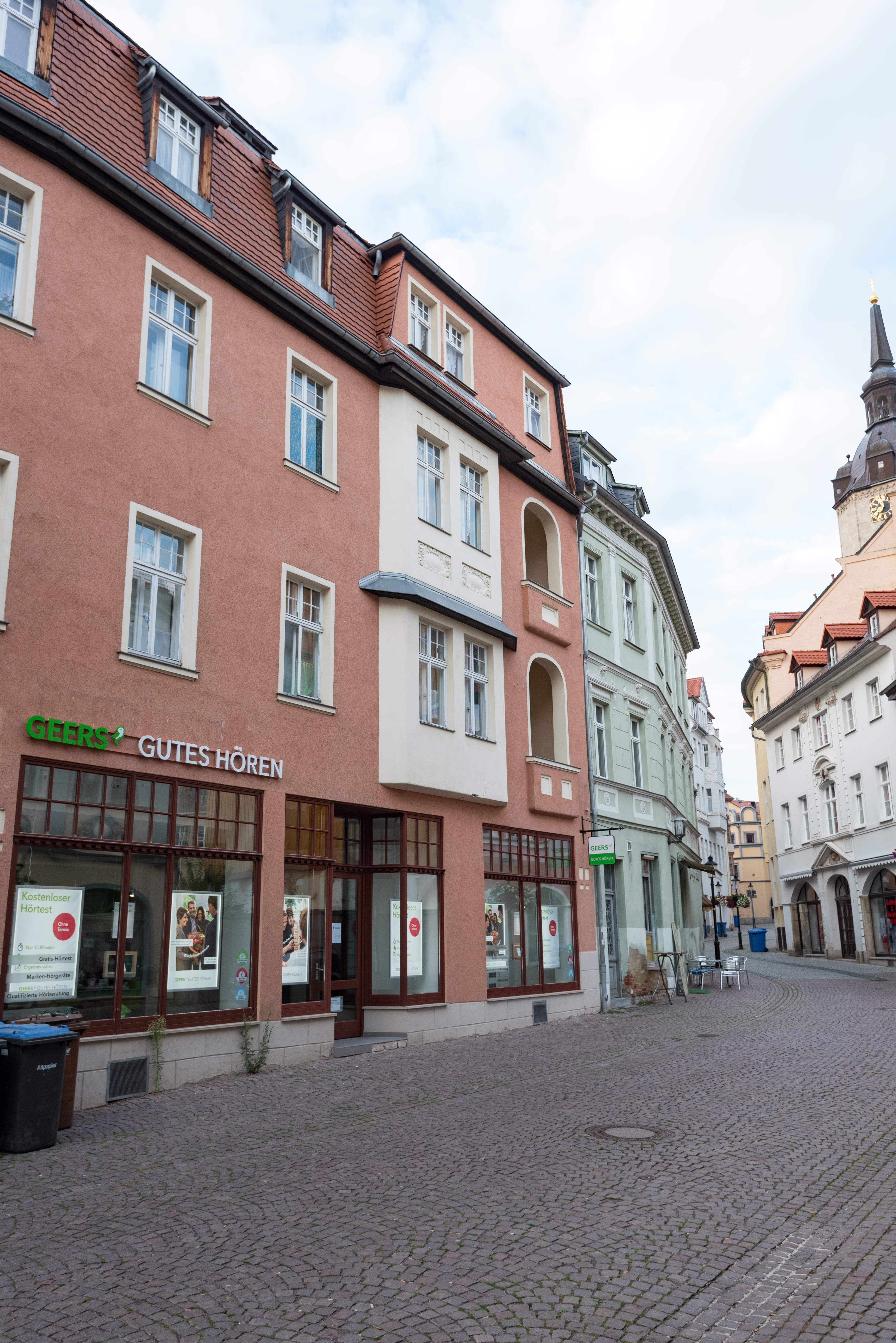 Naumburg (Saale), Salzstraße 4, 5